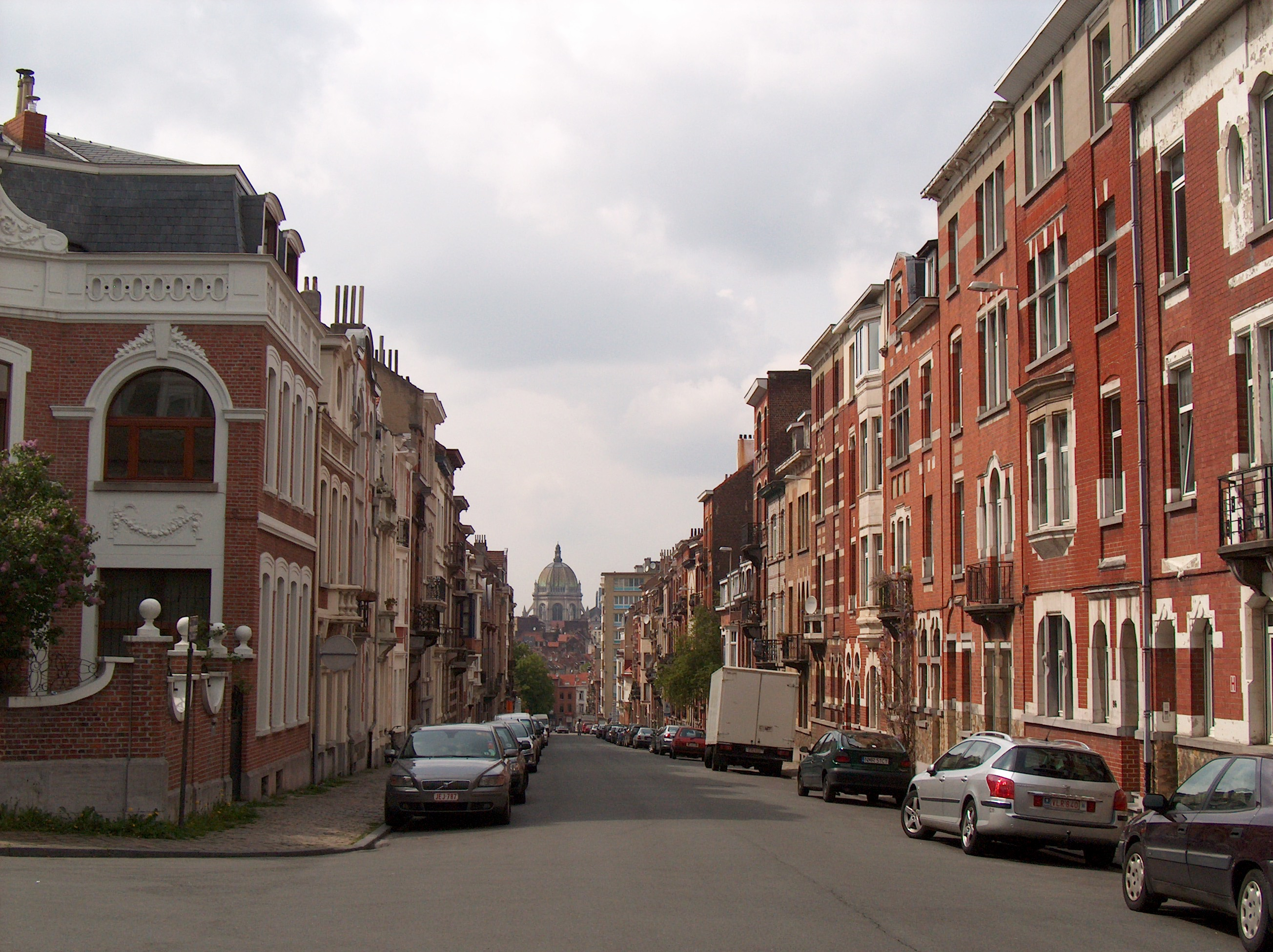 La rue Van Hammée à Schaerbeek, Bruxelles, Belgique. Dans le fond, l'église Royale Sainte-Marie